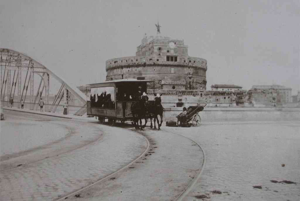 tram a cavalli a san pietro